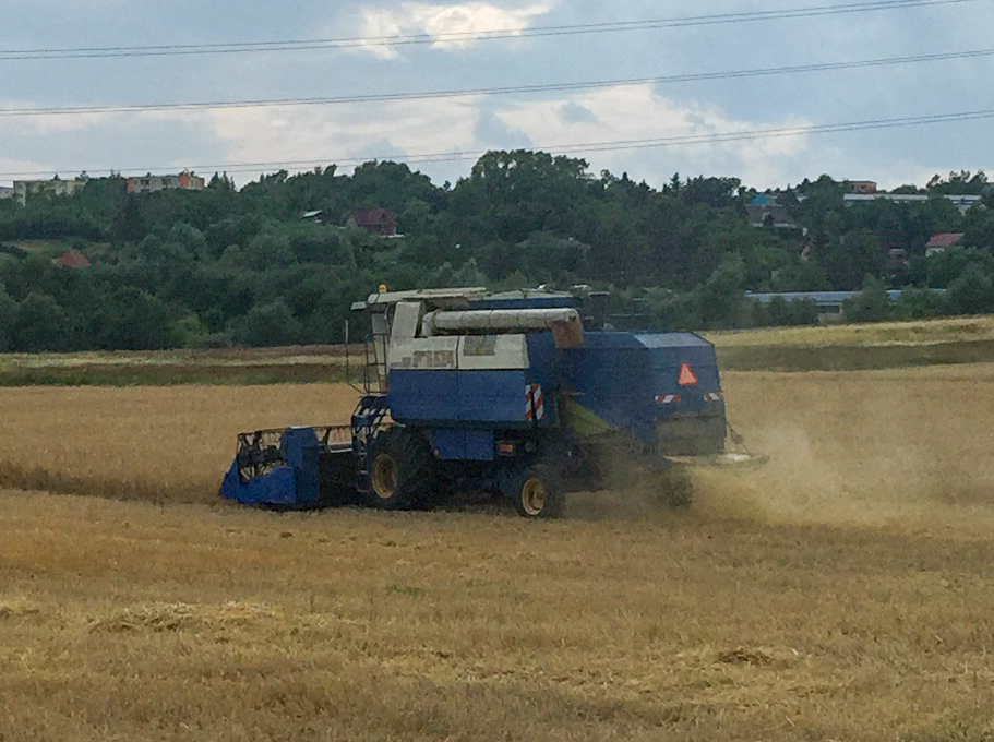 ERNTEMEISTER E 524